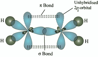 অ্যালকিন গ্রুপের প্রথম সদস্যের অরবিটাল গঠন